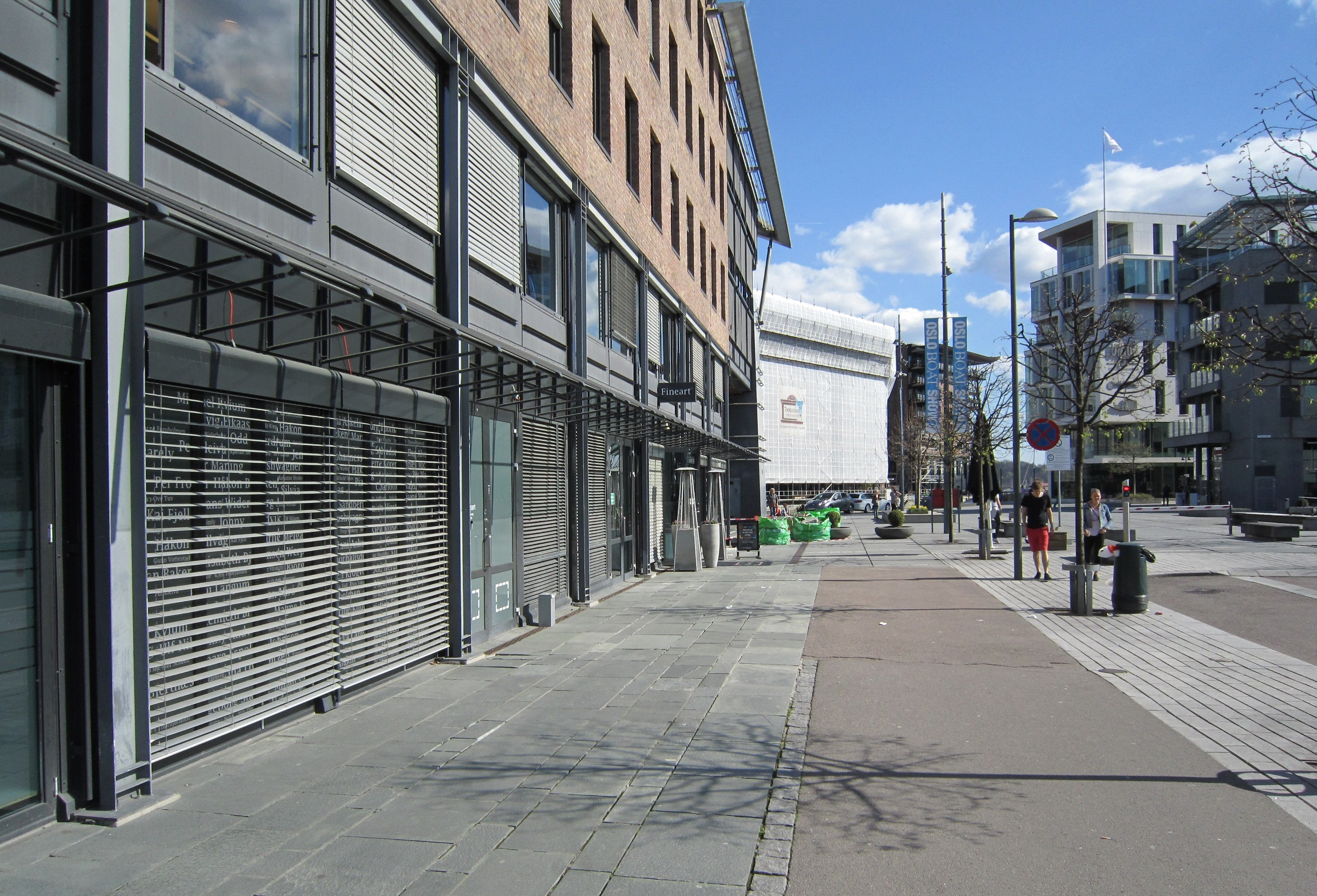 Filipstadveien ved Tjuvholmen i Oslo